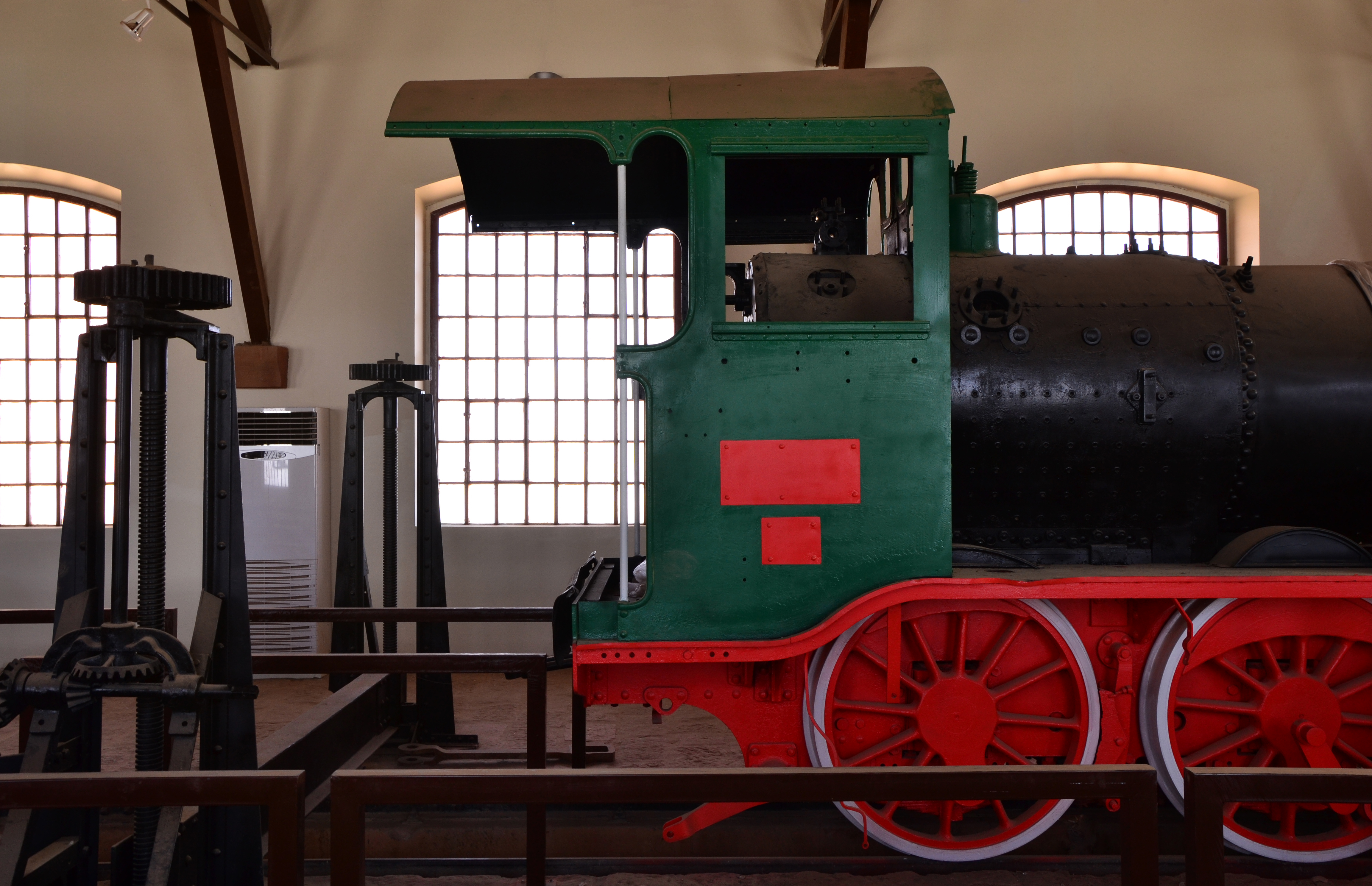 Madain Saleh